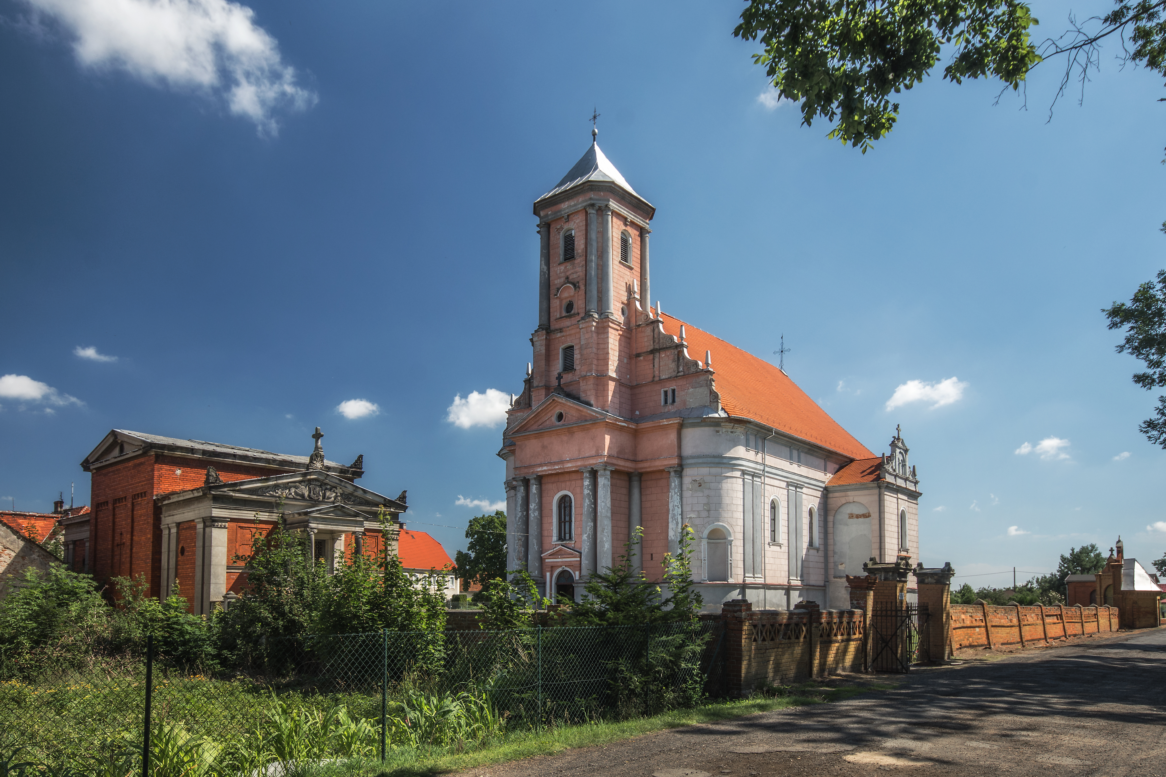 Kopice, kościół par. p.w. Św. Krzyża, 1802-1822